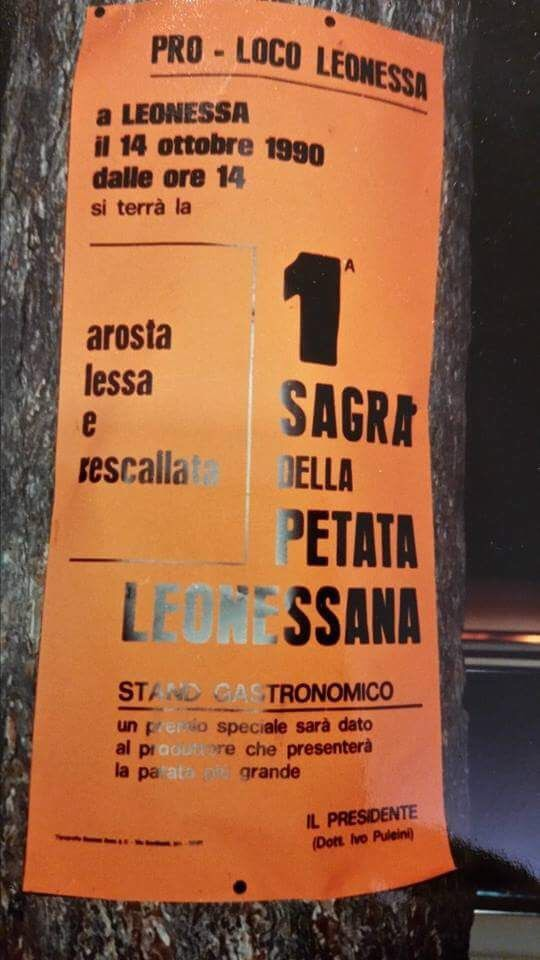 Prima locandina della Sagra della Petata (1990)